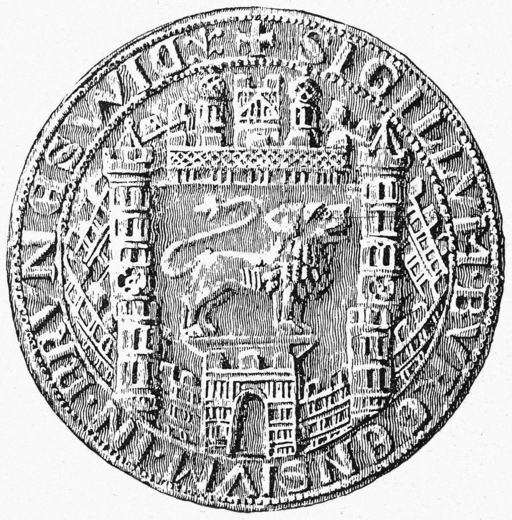 Braunschweig: Siegel der Stadt mit dem Braunschweiger Löwen